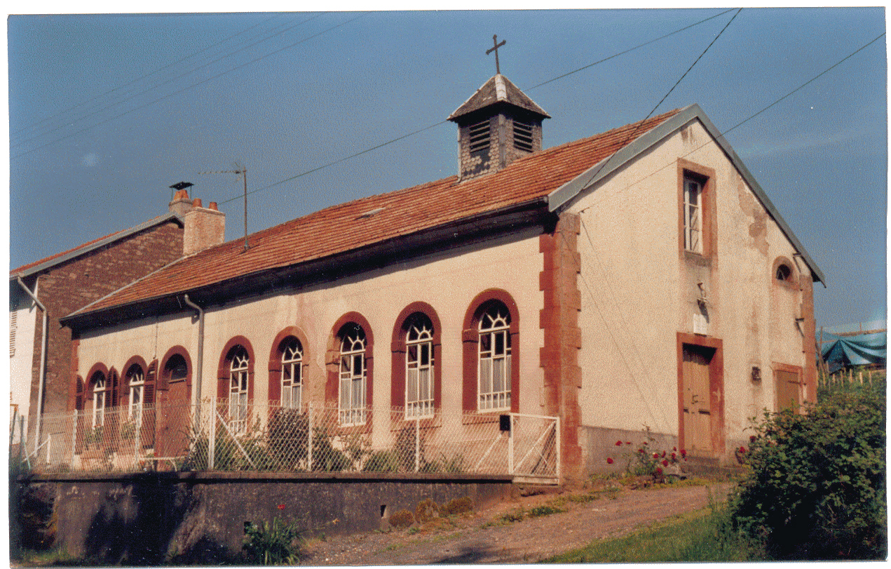 Le temple et son logement à gauche.